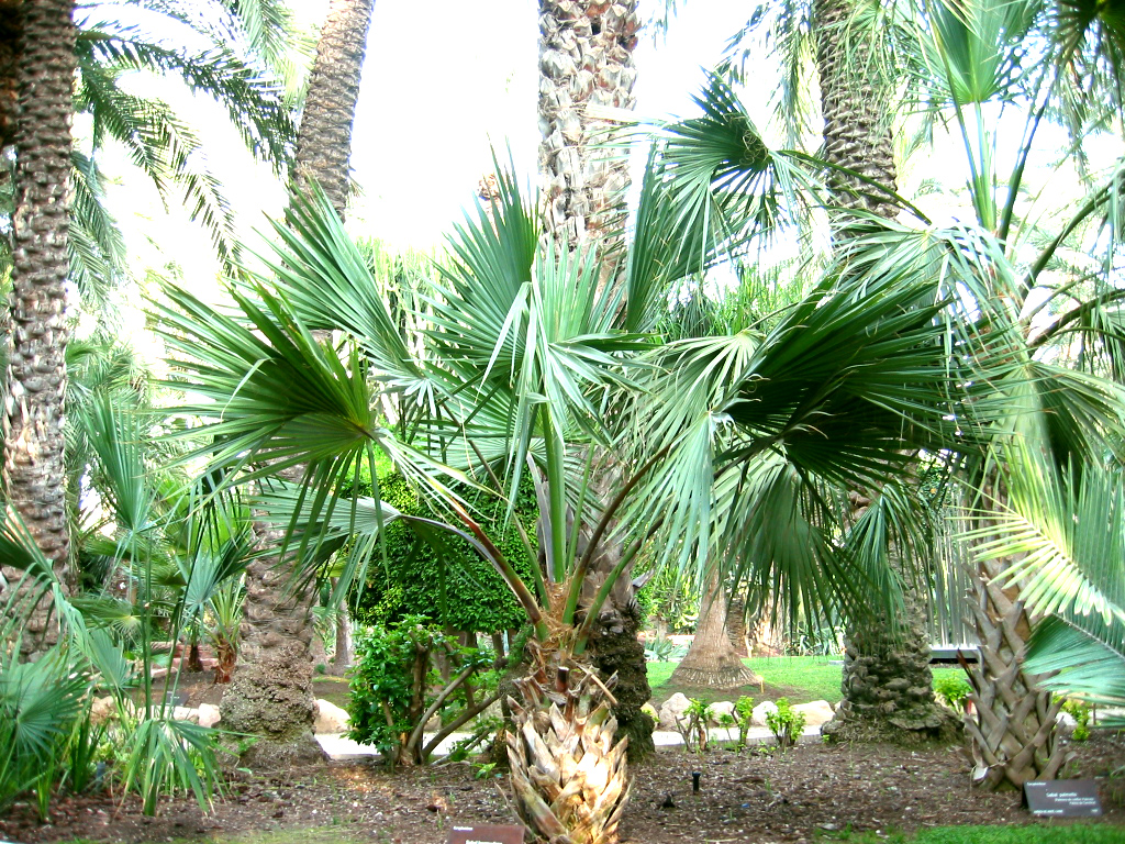 Sabal bermudana en el Huerto del Cura